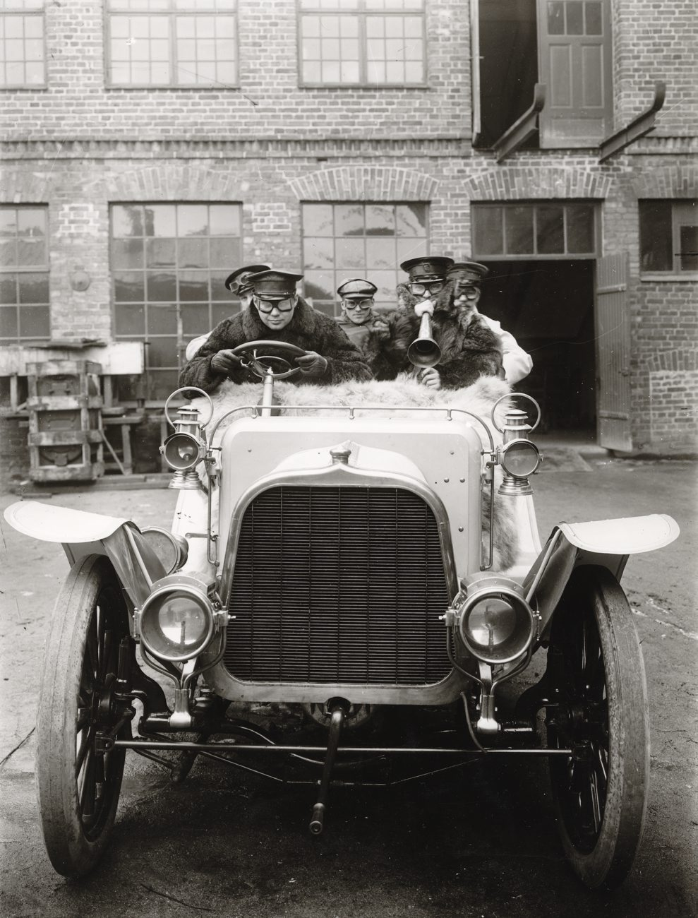 Automobil av märket Pope-Toledo VI med passagerare utanför Gustaf LM Ericssons Automobilfabrik, Arbetaregatan 4 (nuvarande Arbetargatan 32-34, kvarteret Ankaret), Kungsholmen, Stockholm. Vid ratten Gustaf LM Ericsson.